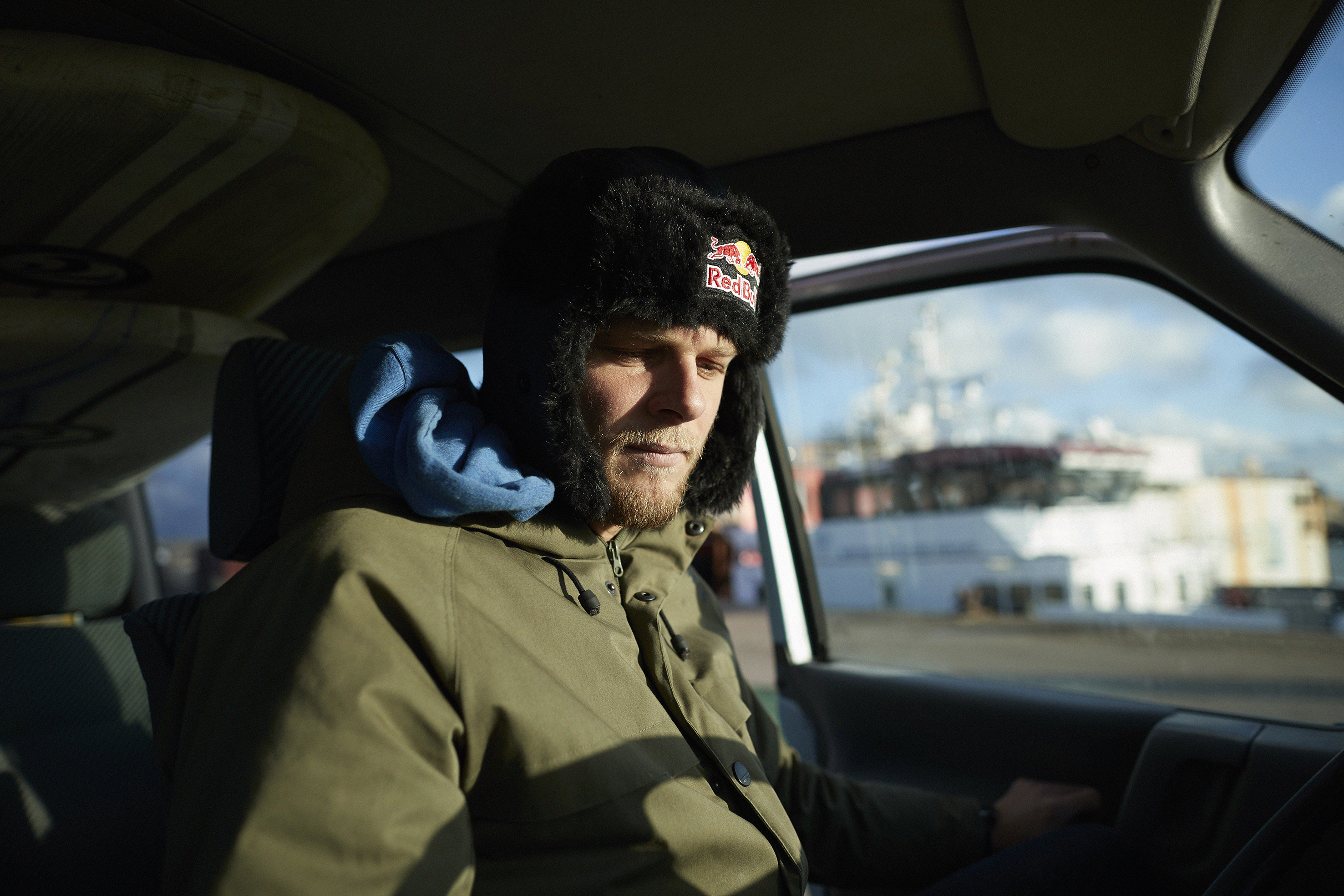 Casper Steinfath kommer fra Cold Hawaii i Thy og er fire-dobbelt verdensmester i Stand Up Padling